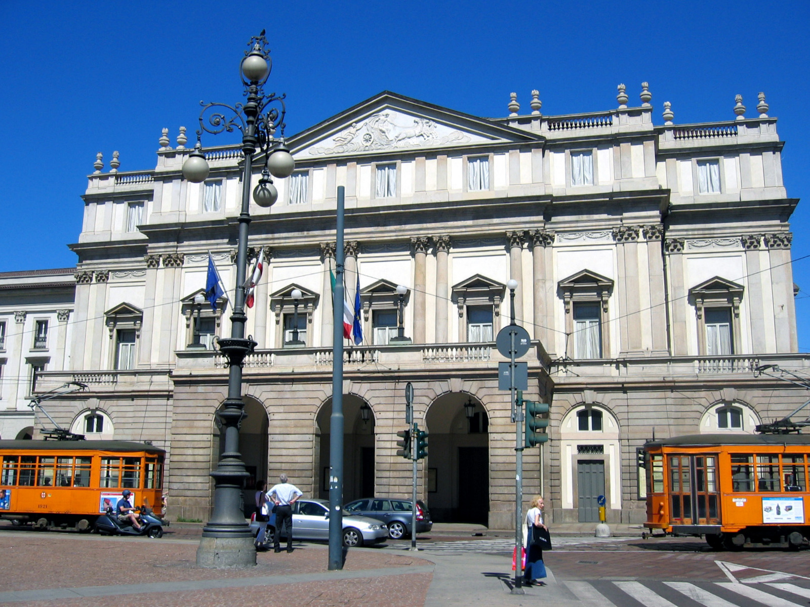 Teatro alla Scala (Milano)